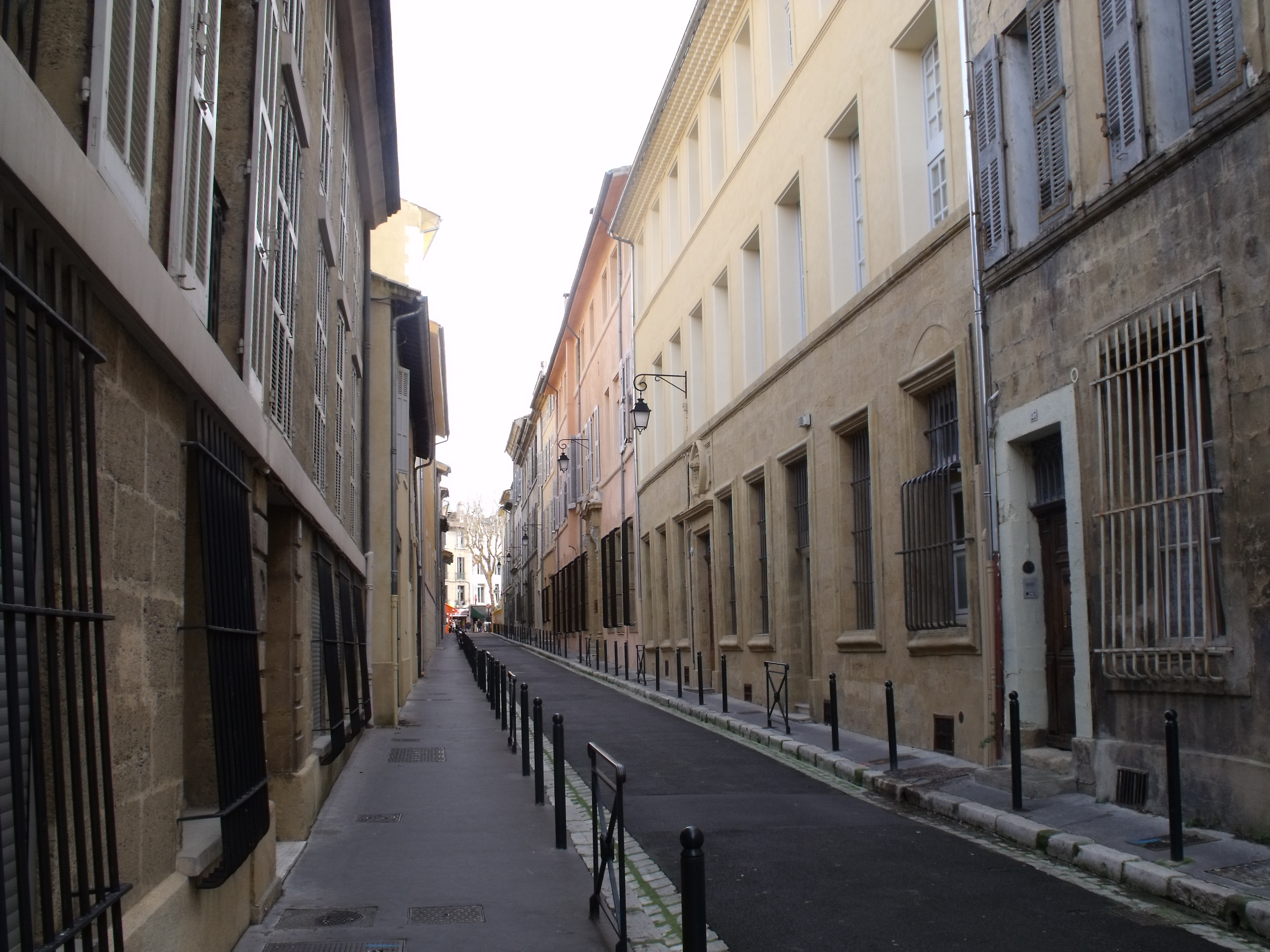 Rue Roux-Alphéran. Aix-en-Provence.